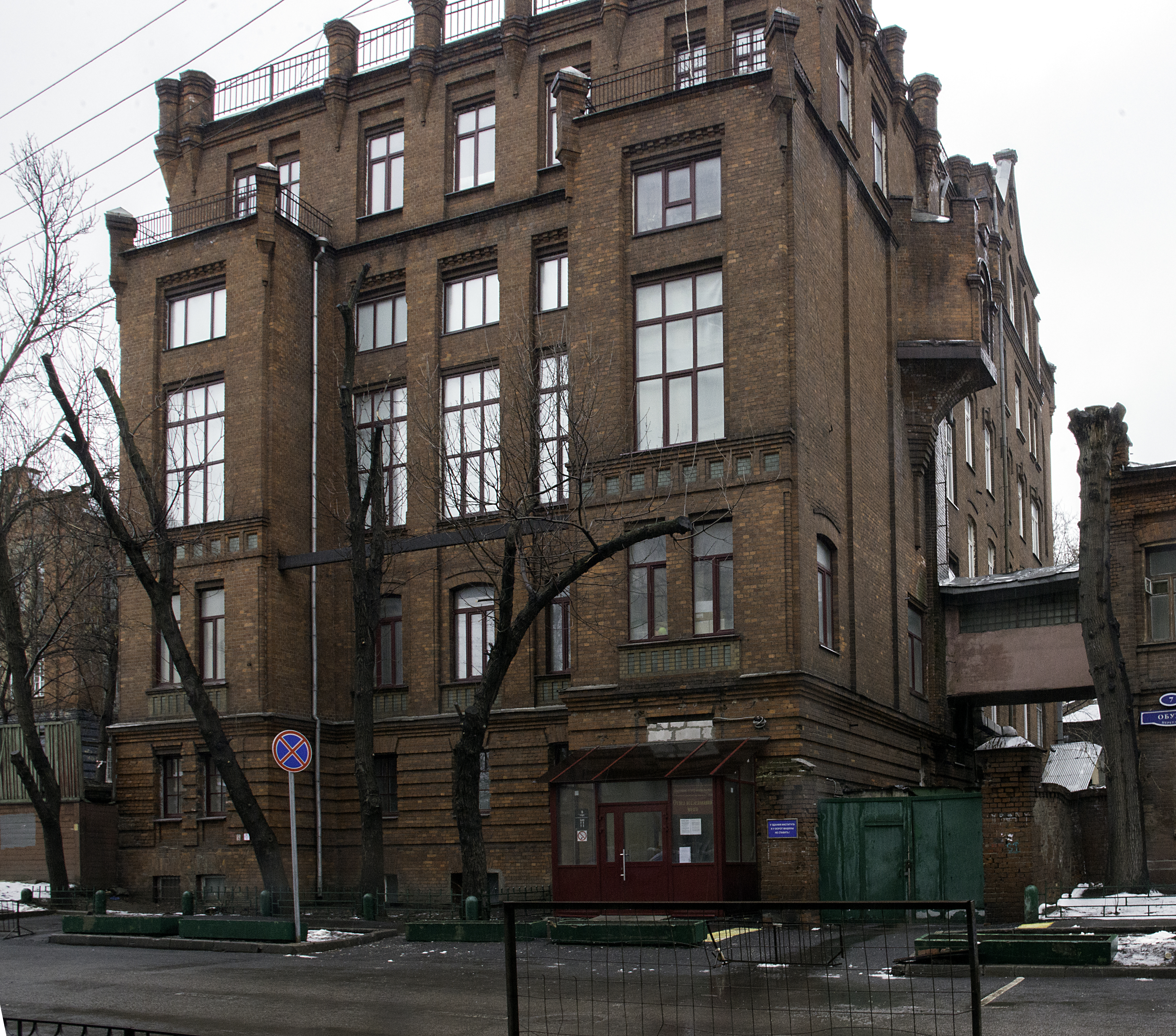 Новый корпус Института по изучению профессиональных болезней имени В. А. Обуха: Обуха пер., дом 5, строение 2, Таганский, Центральный округ, Москва. Построен в 1926—1927 годах. Ныне — Отдел исследований мозга Научного центра неврологии